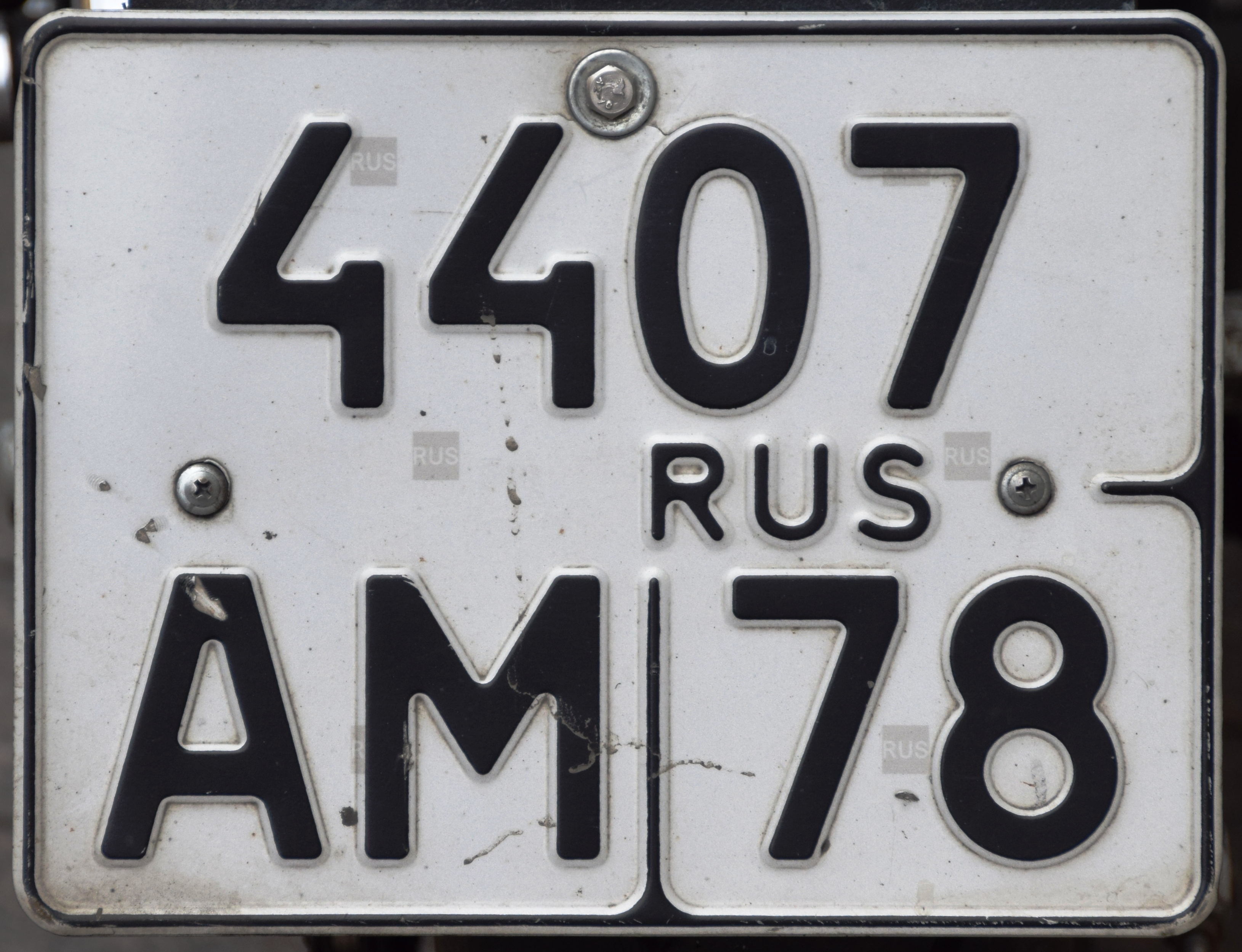 motorfiets kentekenplaat in Rusland